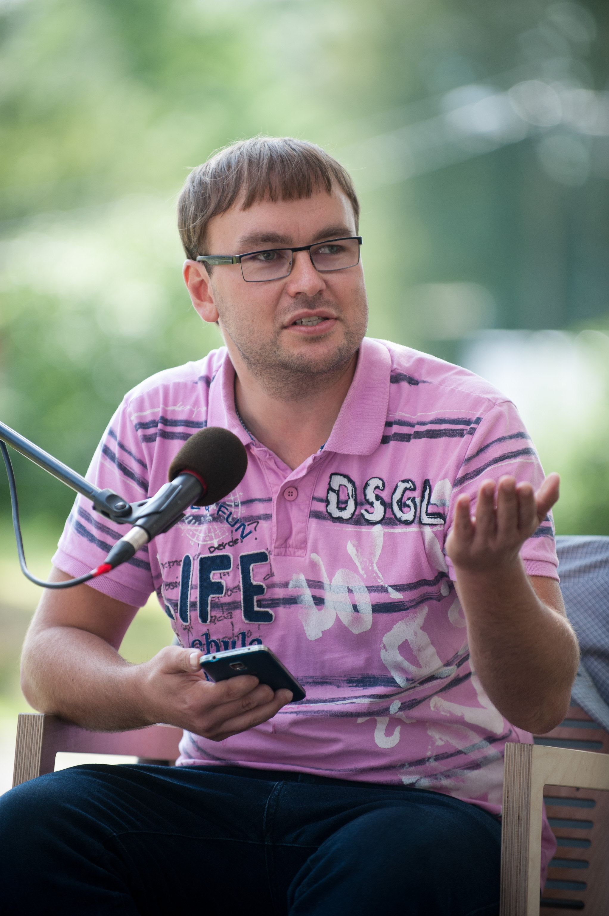 Arvamusfestival 2014: "Kas dopinguvabasport on võimalik?"